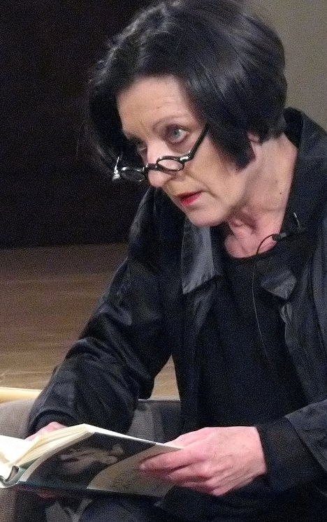 Herta Müller, poet, Nobel Laureate 2009